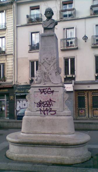 Statue Taylor place Johann-Strauss - Paris Xe